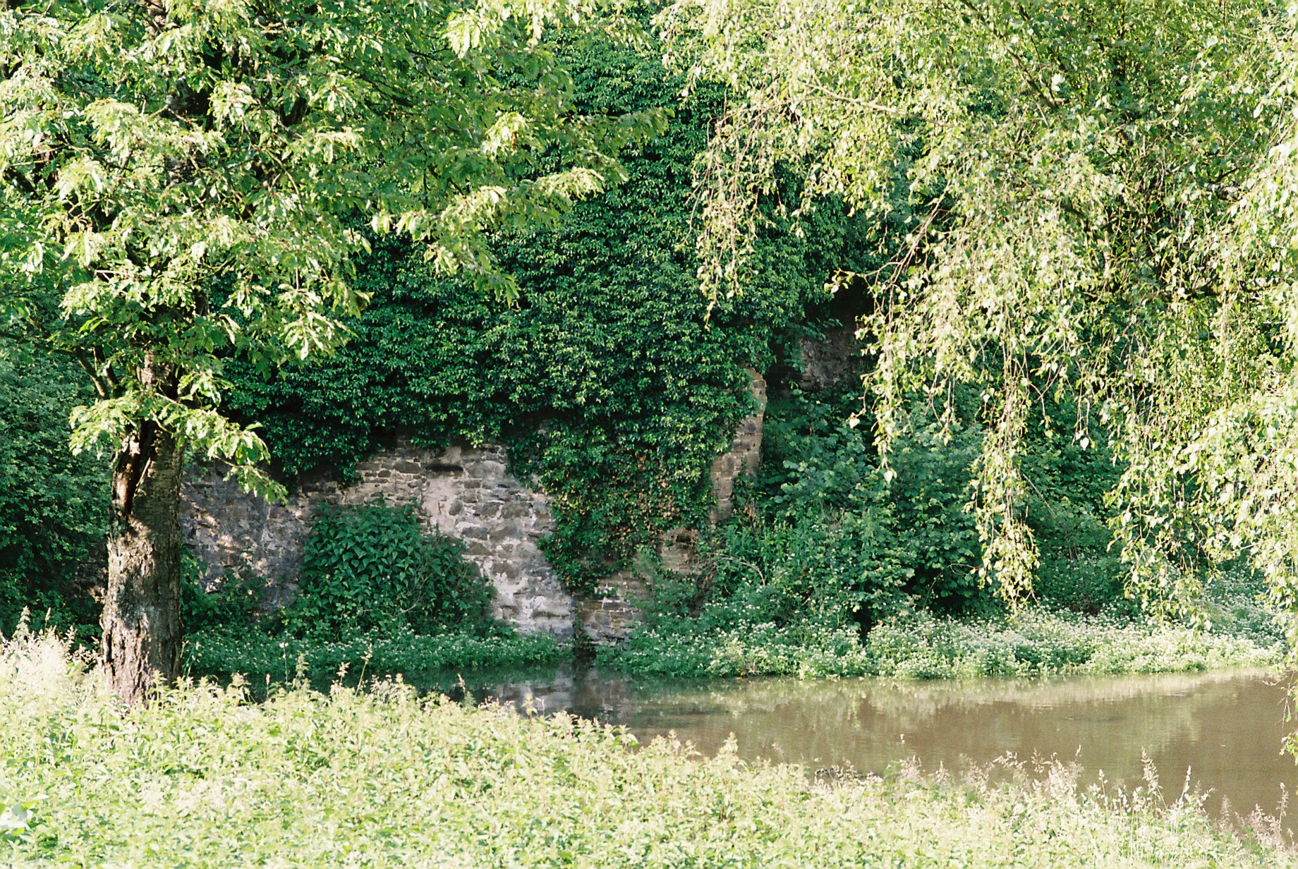 Burg Schönrath in Lohmar, überwachsene Mauerreste der Hauptburg